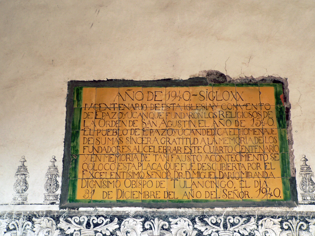 Información del Ex Convento de San Andrés Apóstol